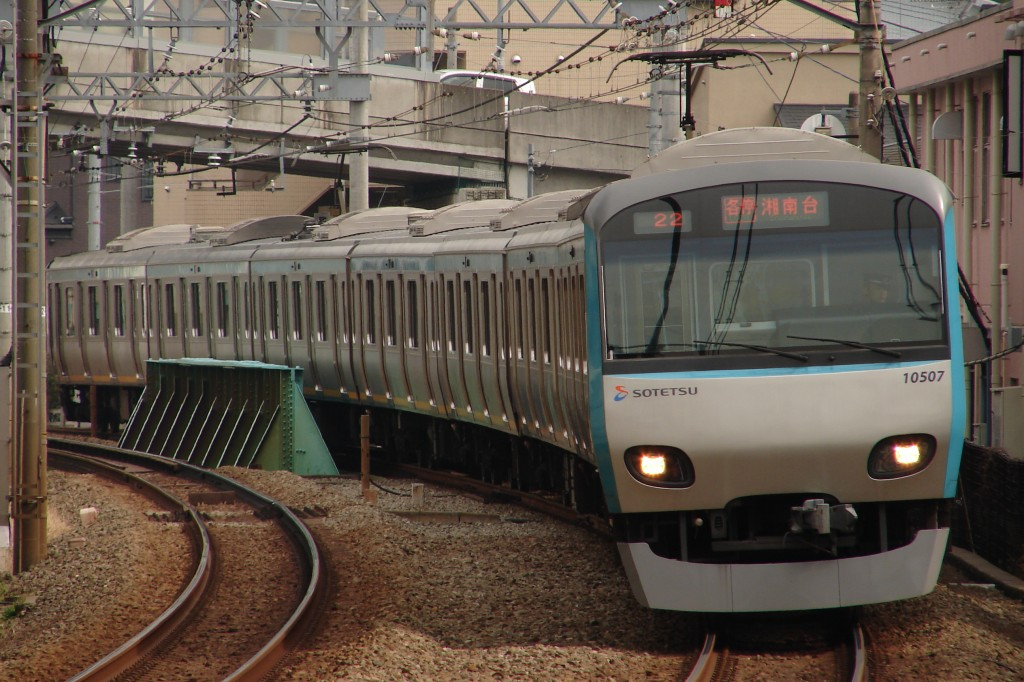 相鉄10000系、ロゴマークの貼り付け場所も前と同じところ。 2007年3月16日、上星川にて本人が撮影。